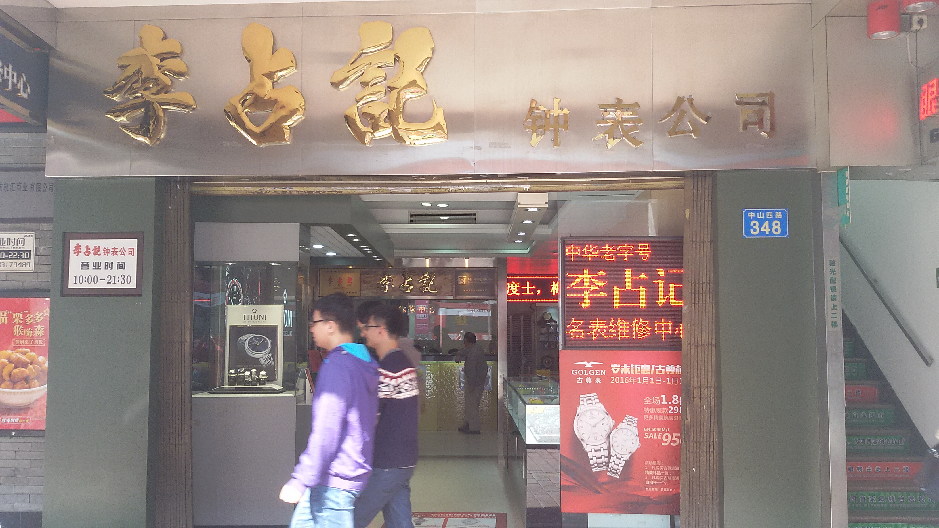 粵語: 李占記